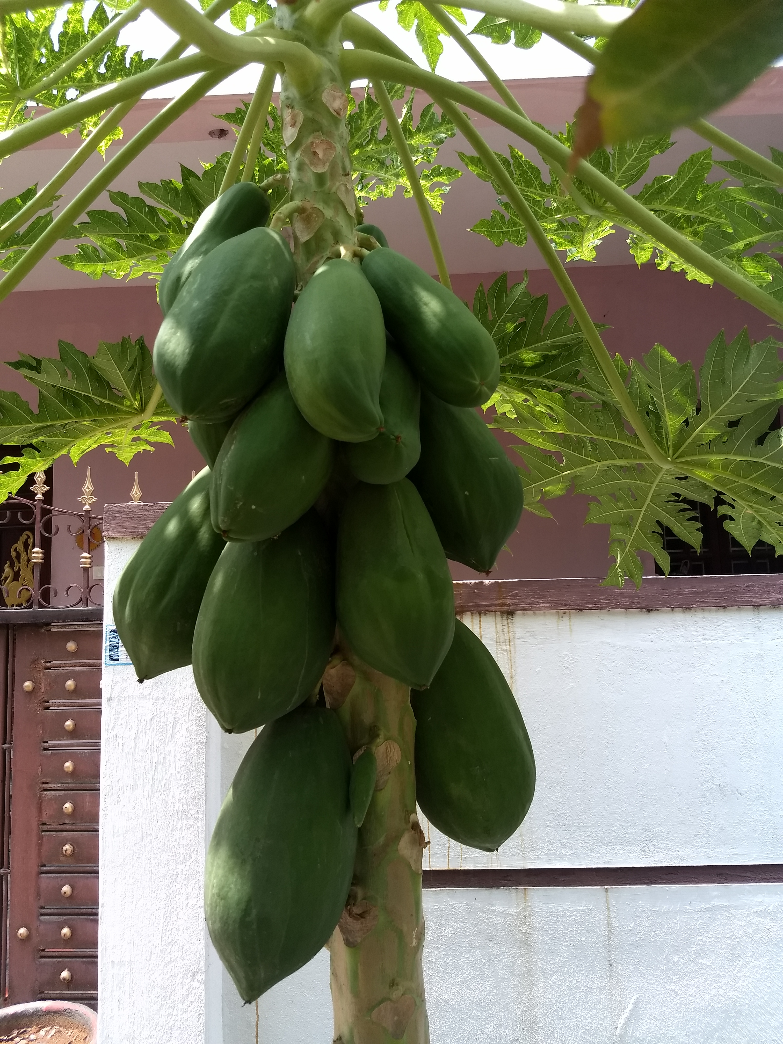 Carica papaya from Tirupur